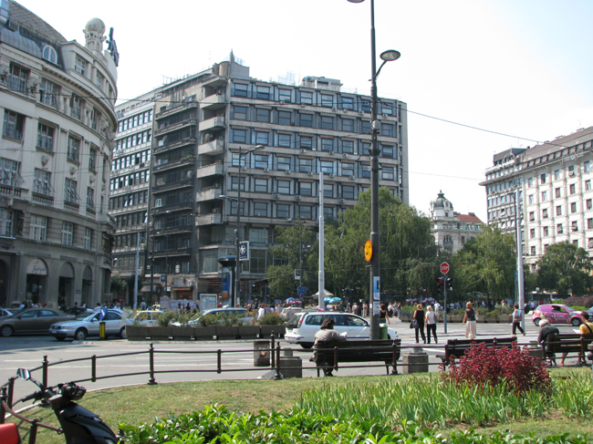 Republique square in Belgrade, Serbia/La Place de la République (Republike trg) à Belgrade, Serbie